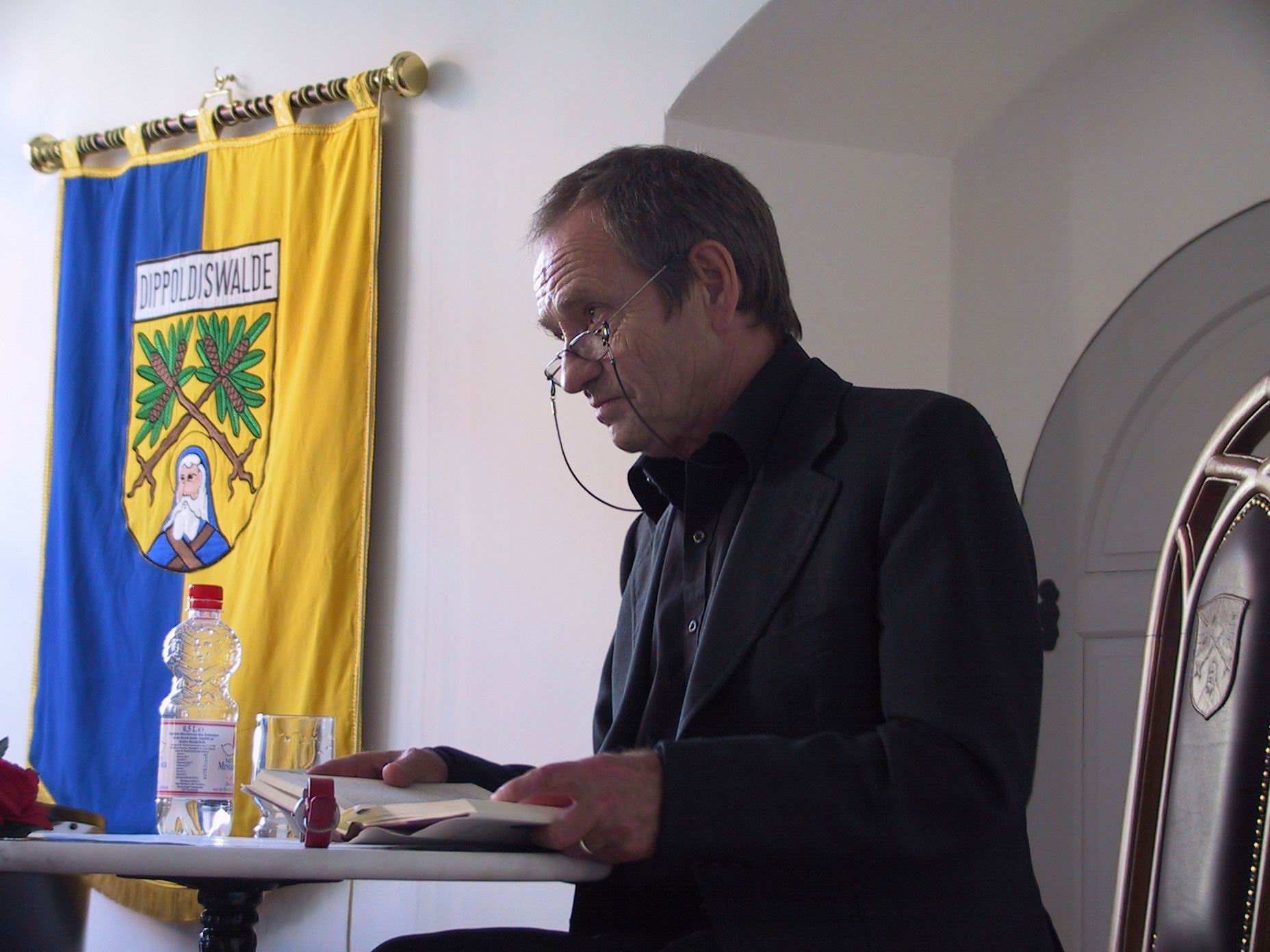 Peter Ensikat (Lesung in Dippoldiswalde am 29.04.2007)